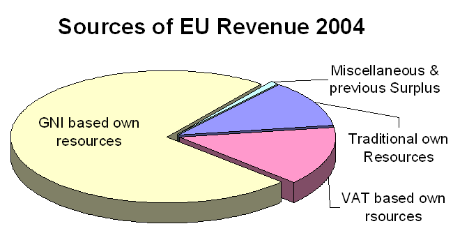 EU revenue sources 2004